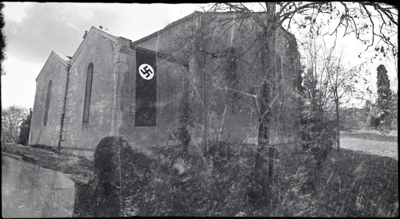 Banderoles nazies sur l'église pendant l'occupation nazie.